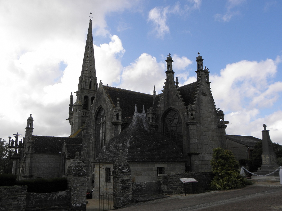 Chevet de l'église Saint-Mélar de Locmélar (29). .